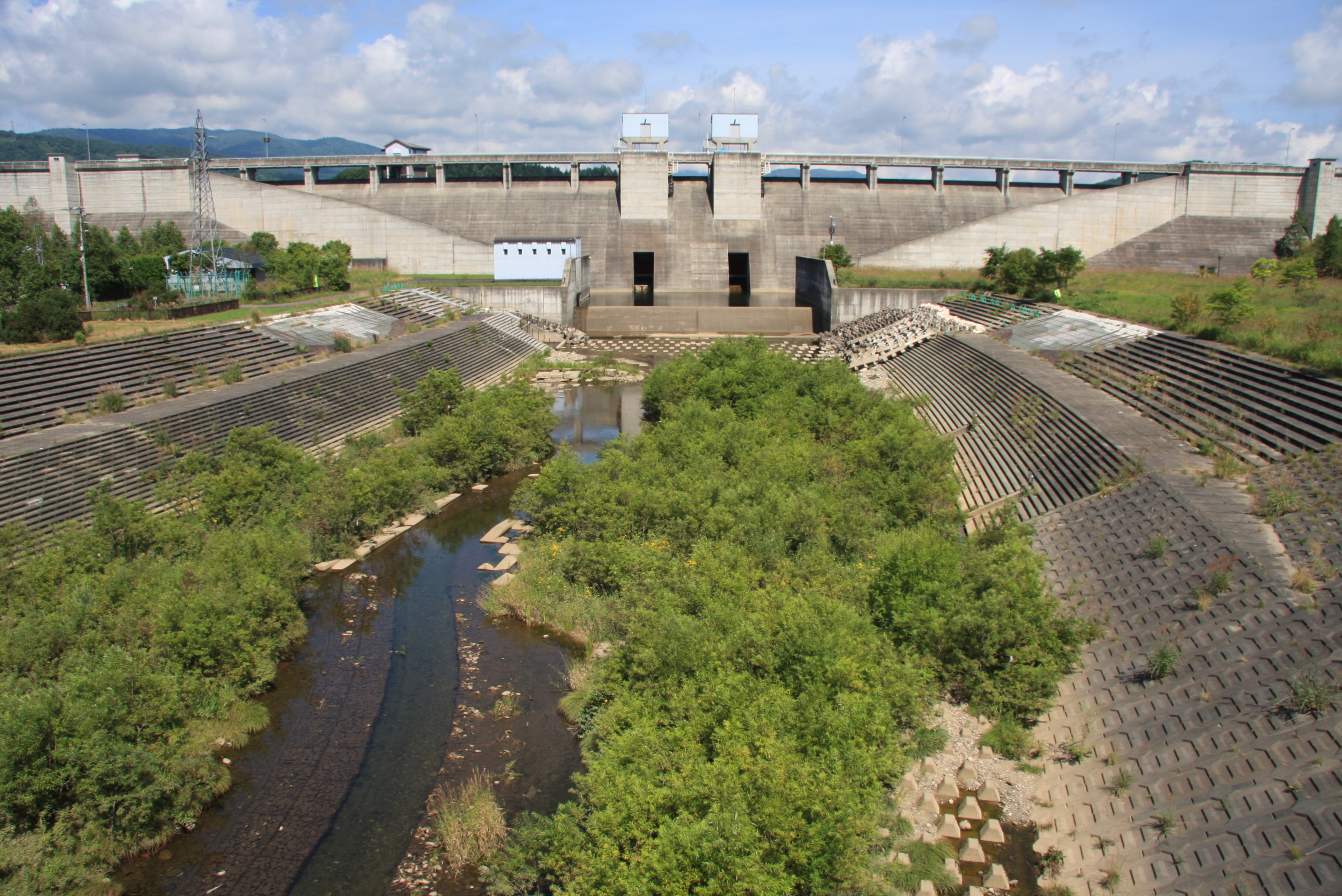 美利河ダム 後志利別川の河道正面より